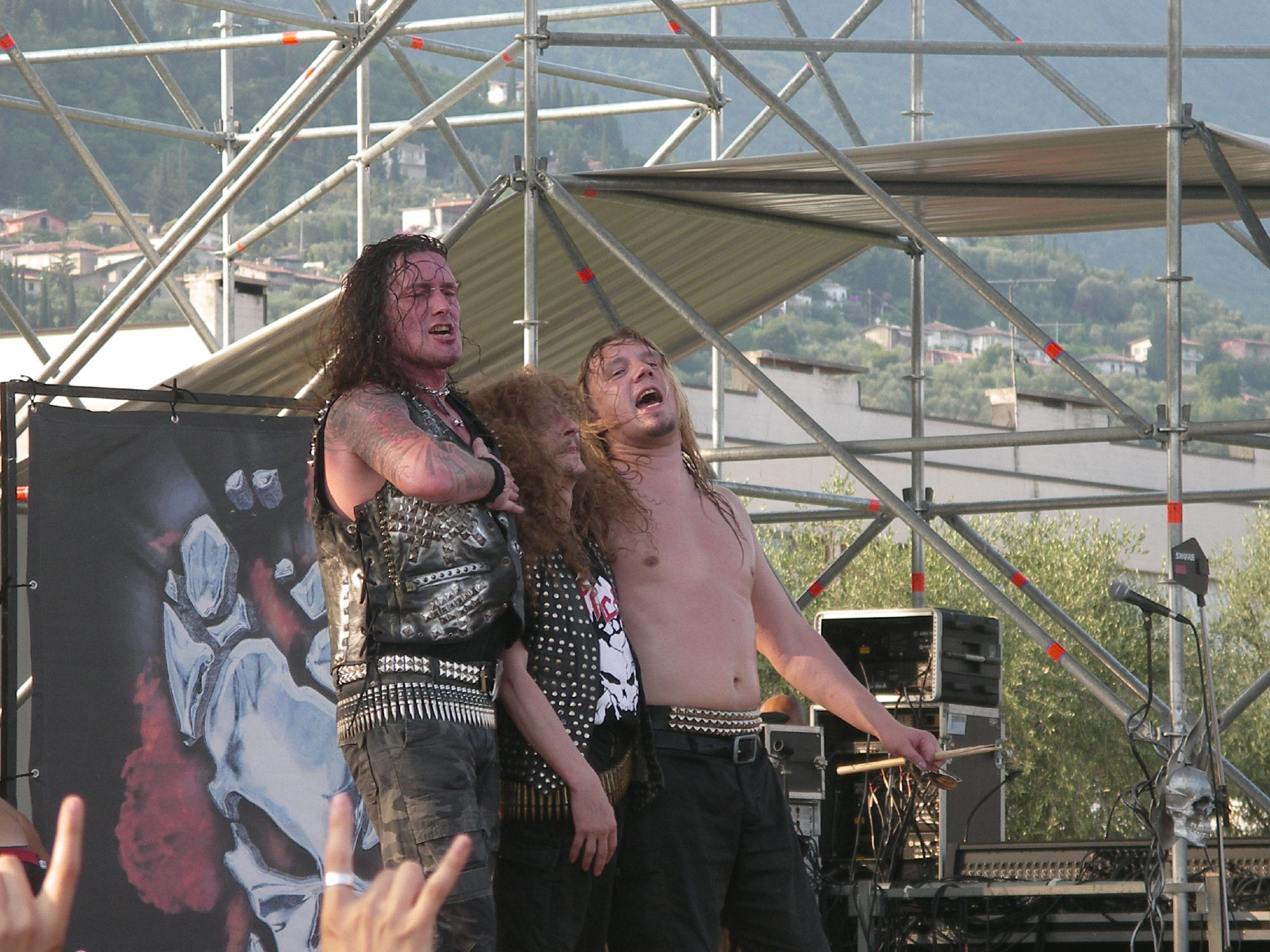 Destruction tras su actuación en el Evolution Fest de 2006.